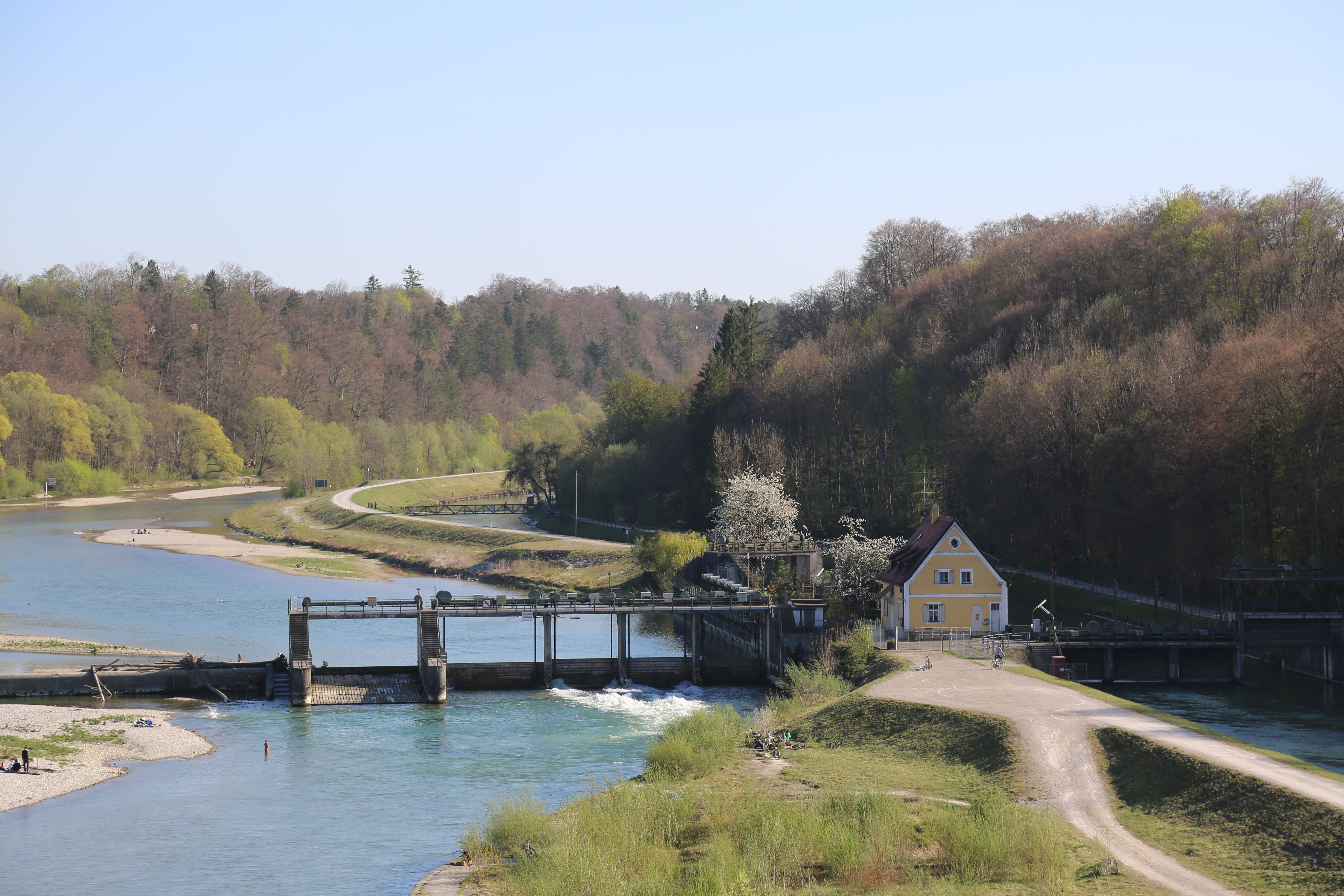 Das Wehr Großhesselohe verbindet den Isar-Werkkanal mit der Isar, südlich von München. Das Bild entstand von der Großhesseloeher Brücke.